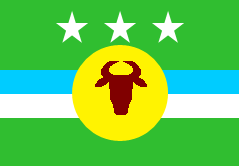 Bandera del municipio Rosario de Perijá